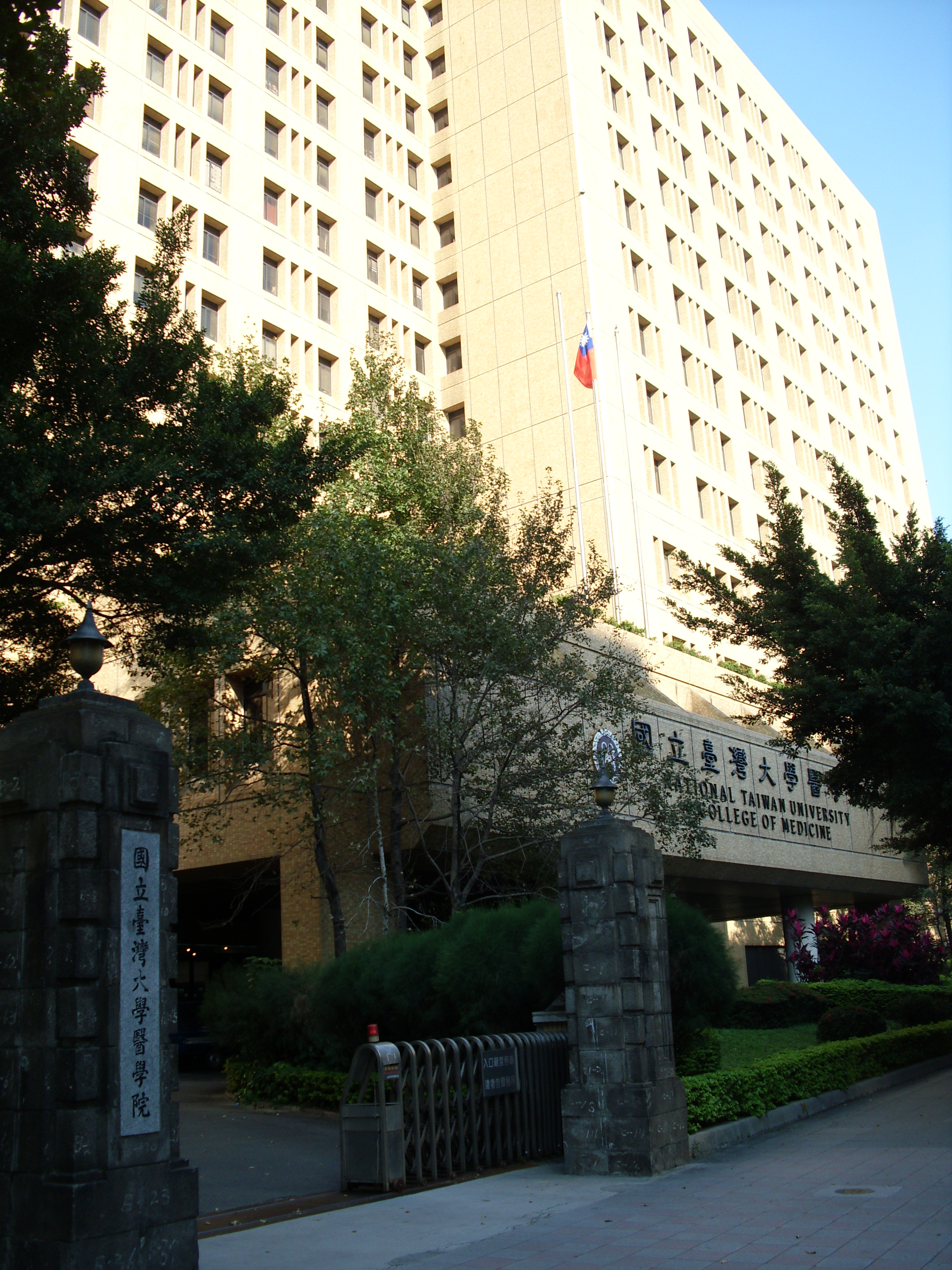 Bân-lâm-gú: 國立臺灣大學醫學院。